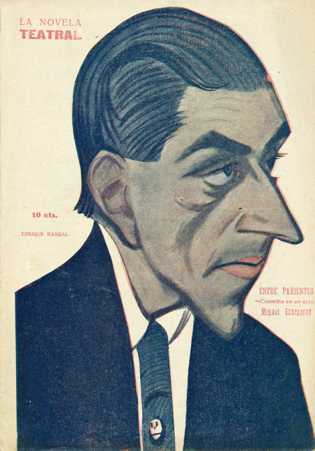 Caricatura de Enrique Rambal García, padre de Enrique Rambal Sacía y abuelo del actor mexicano Enrique Rambal.